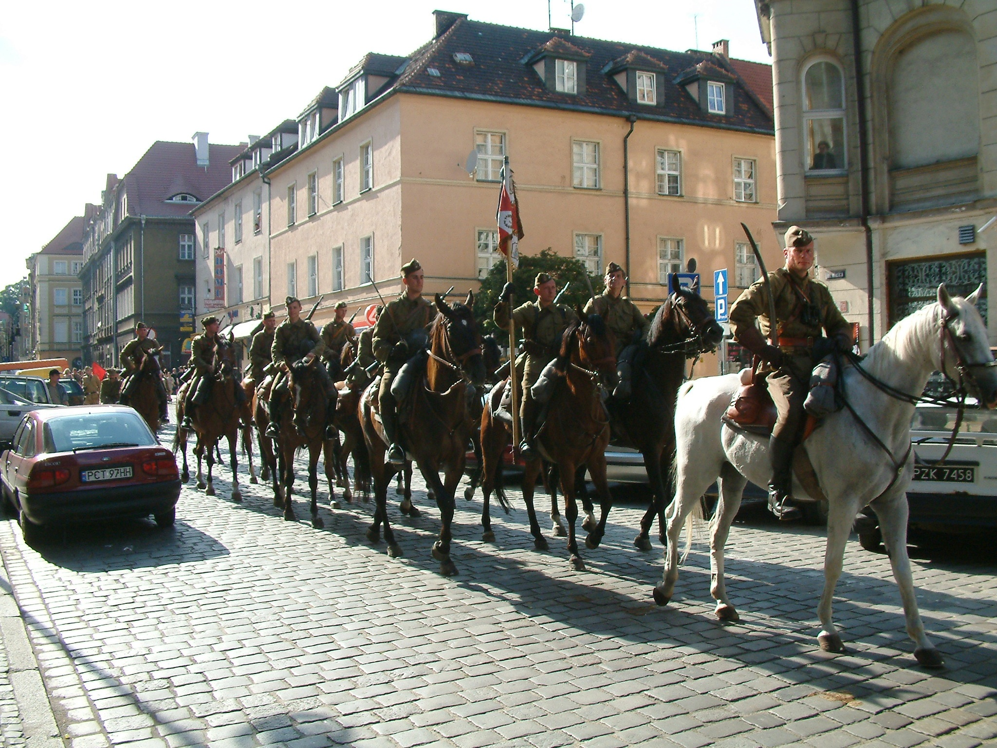 Oddział Terenowy Stowarzyszenia Polski Klub Kawaleryjski in Poznań in uniforms of 7th Mounted Shooters Regiment